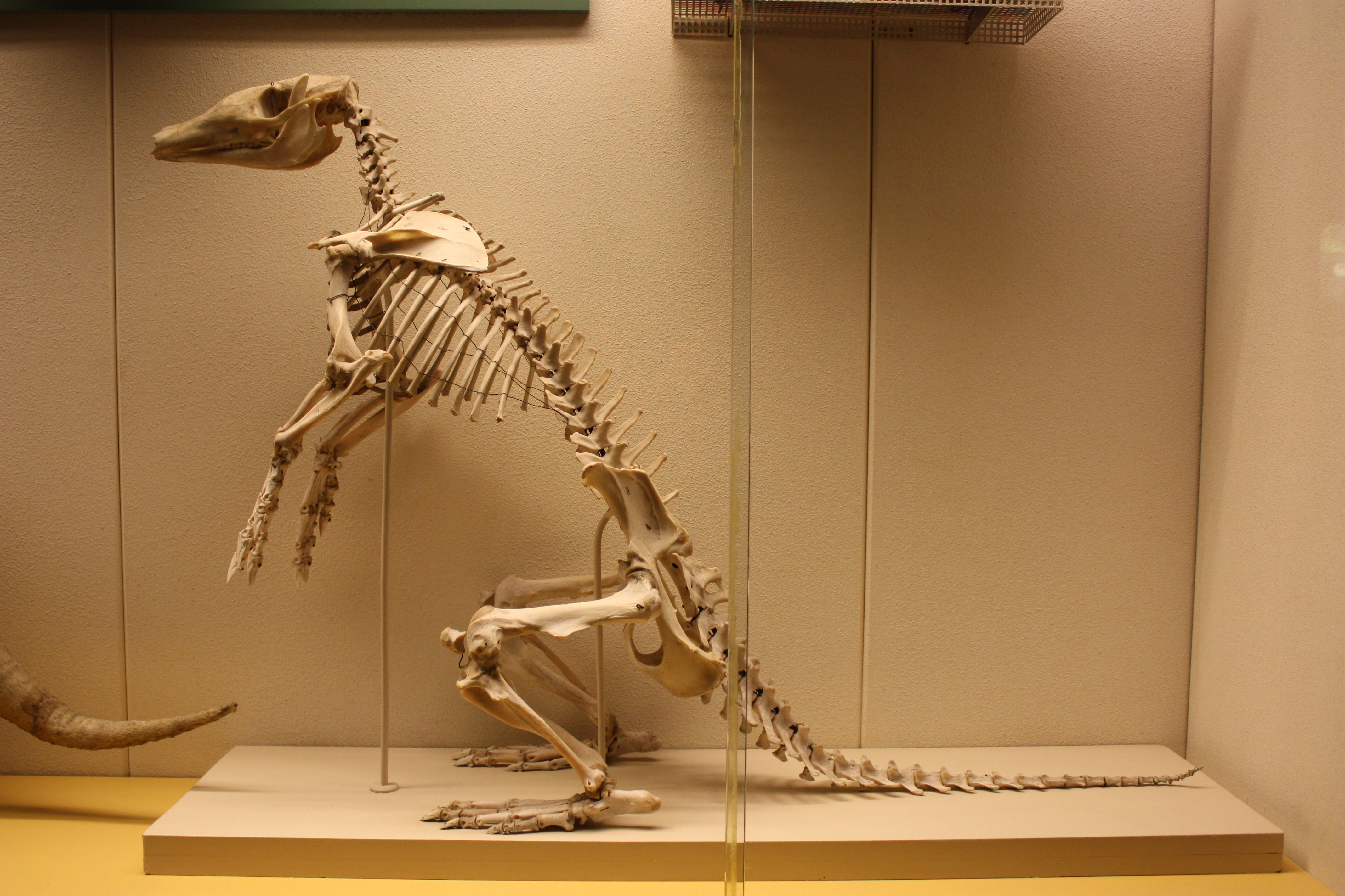 Squelette de Tubulidentata. Royal Belgian Institute of Natural Sciences Native nameMuséum des sciences naturelles de BelgiqueLocationBrusselsCoordinates50° 50′ 13″ N, 4° 22′ 34″ E Established1846Website control VIAF: 141862693 ISNI: 0000 0001 2171 9581 SUDOC: 027912310 BNF: 11985256w